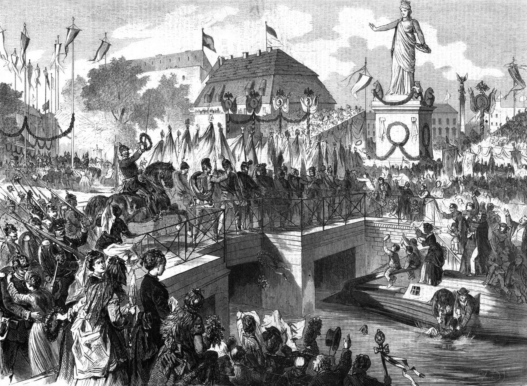 Heimkehr des Heeres nach Berlin am 16. Juni 1871. Bildunterschrift war: Der Triumpheinzug der Truppen in Berlin am 16. Juni 1871: Begrüßung an der Kolossalstatue der Berolina am Halleschen Tor. Originalzeichnung von H. Scherenberg.